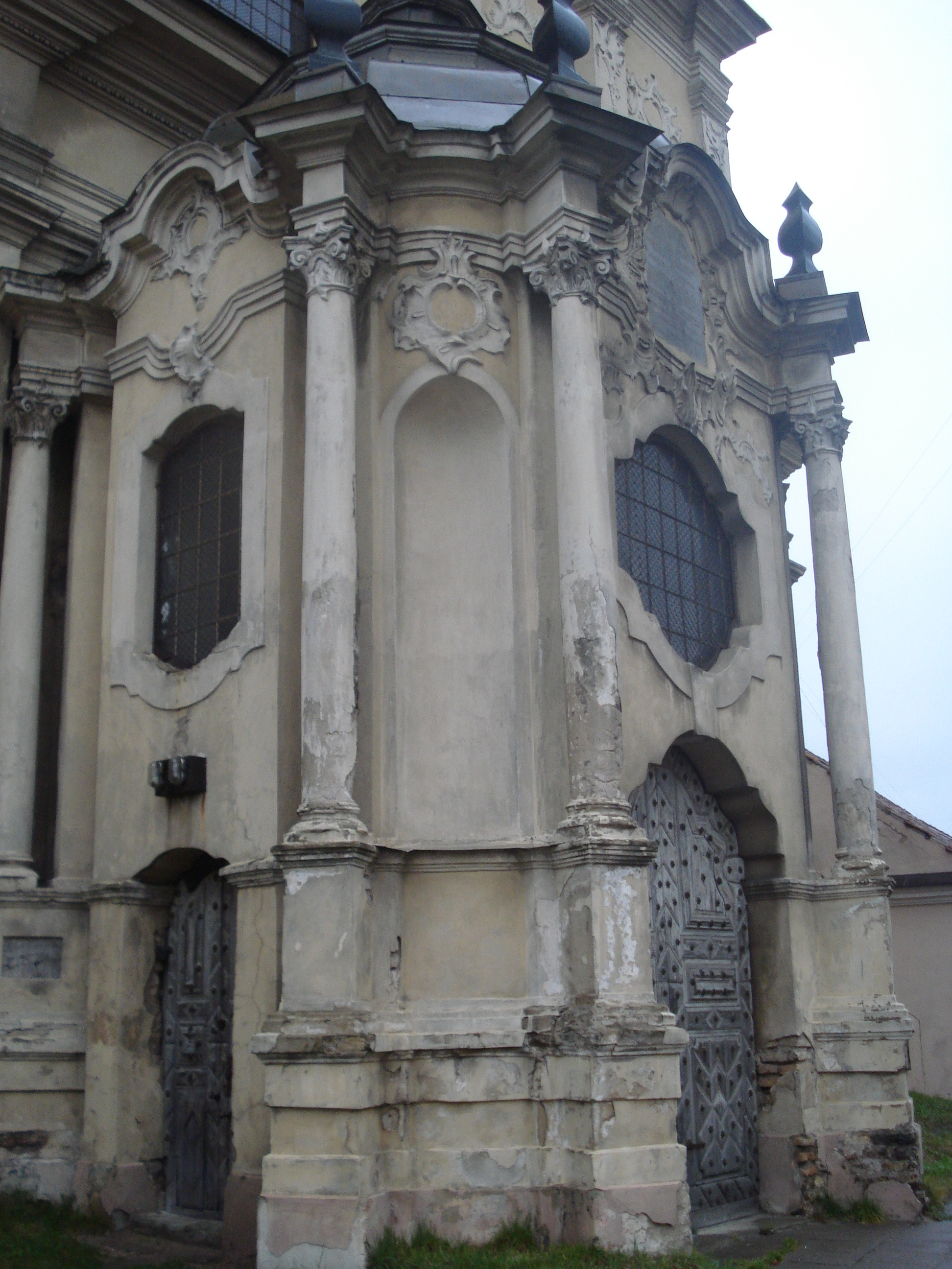 Church of Ascension (Missionaries) in Vilnius = Dangun įžengimo (Misionierių) bažnyčia = Kościół Misjonarzy w Wilnie (Subačiaus g.). Entrance